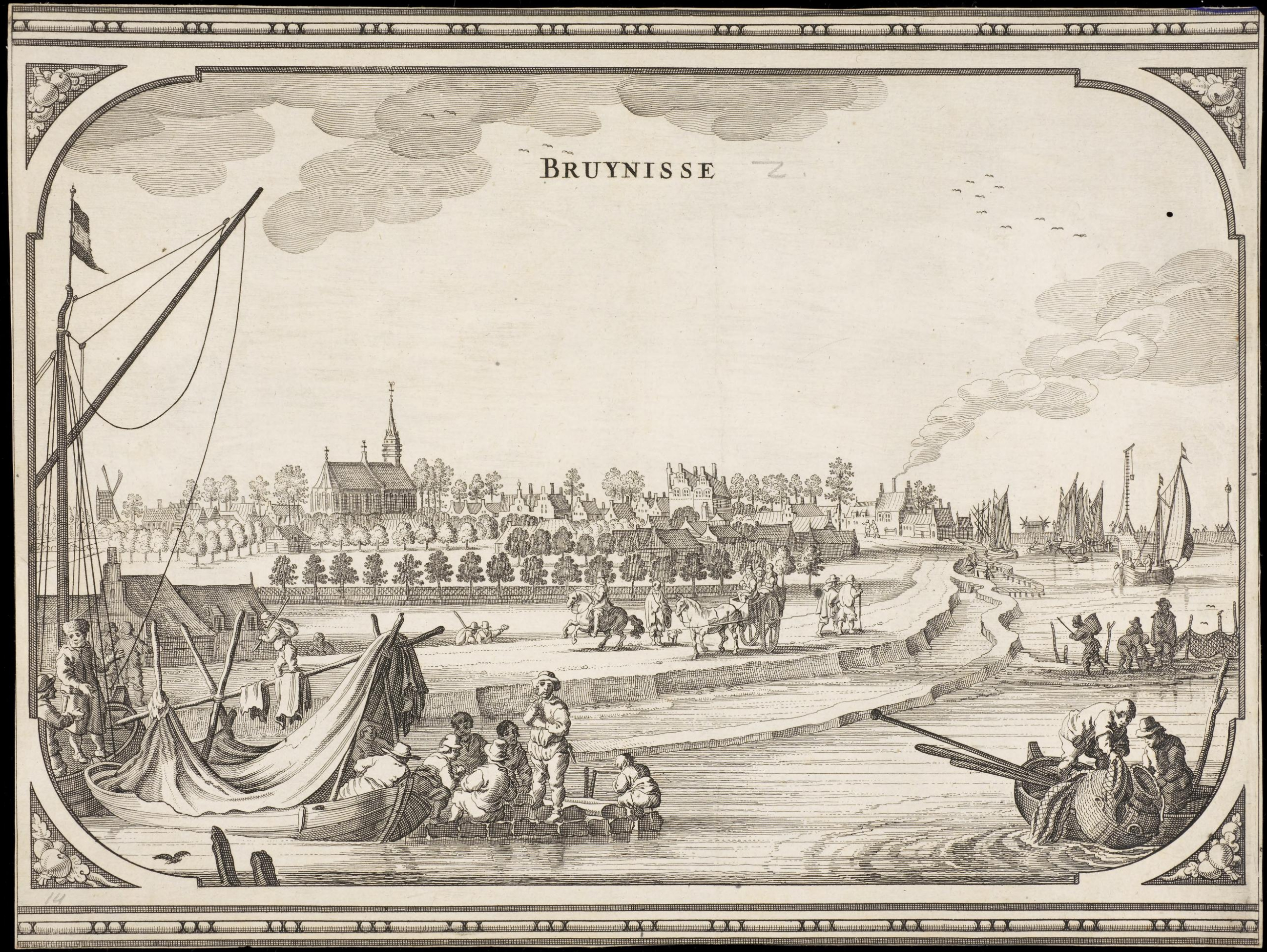 17de eeuws gezicht op Bruinisse